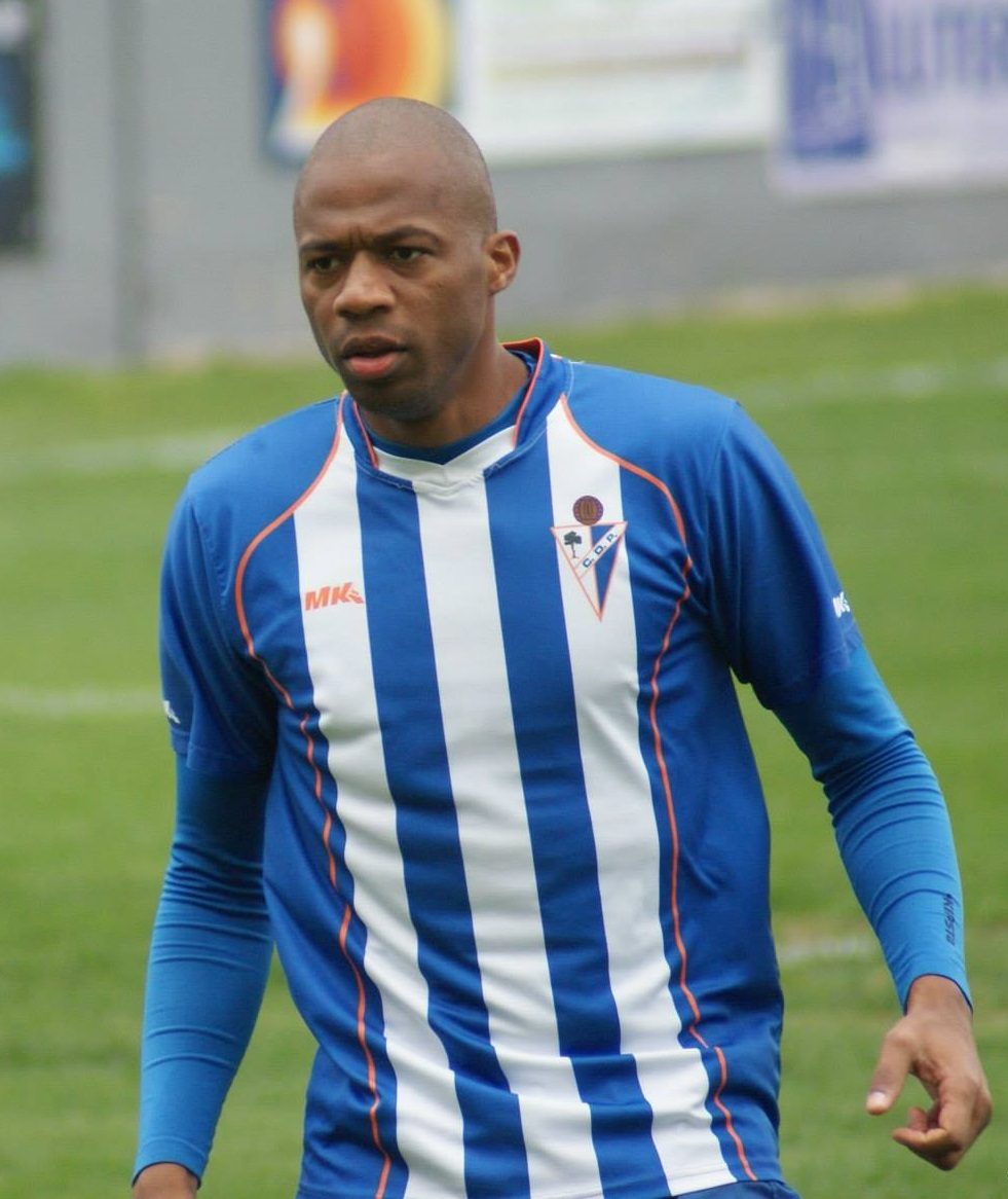 Jogador